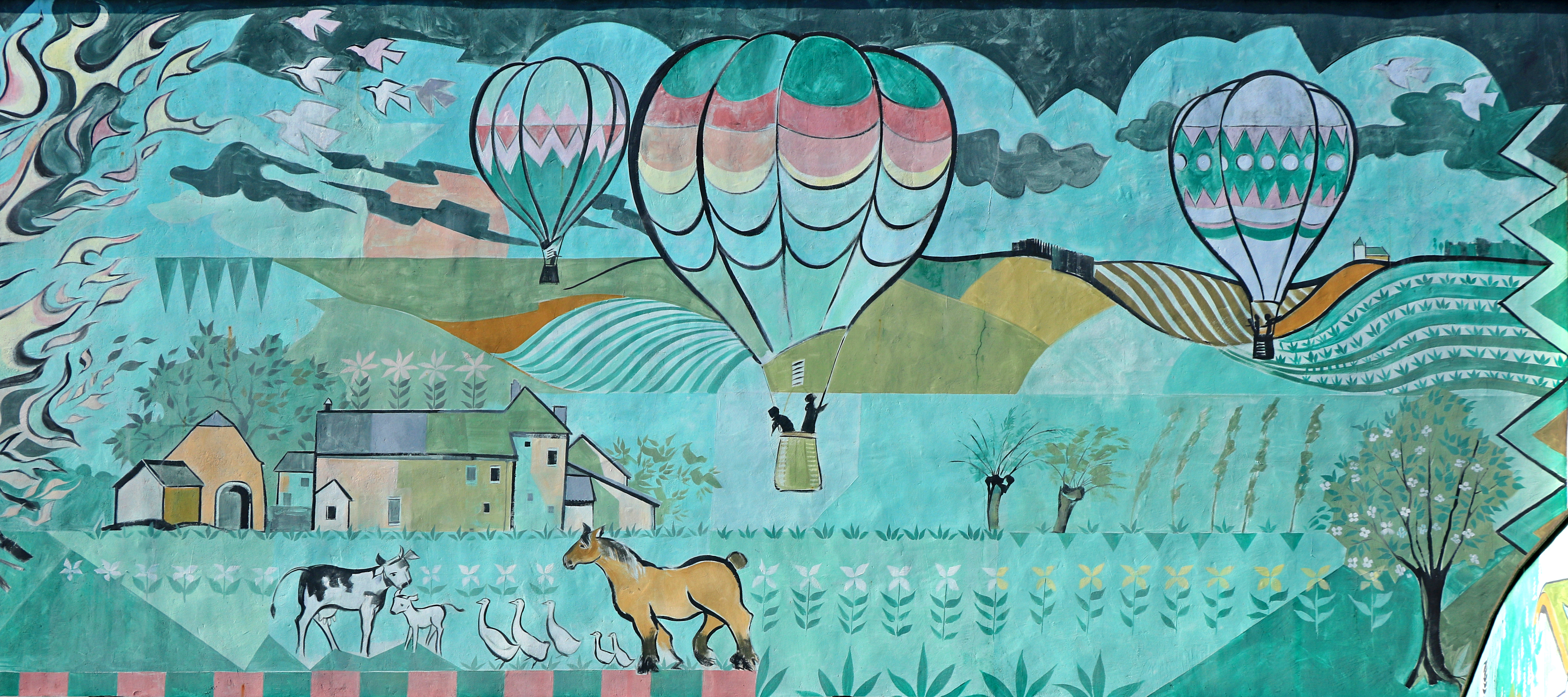 Belgique - Ottignies - Centre culturel - Fresque « La Liesse populaire » (Claude Rahir, 1993) : départs de montgolfières depuis la place Communale de Céroux